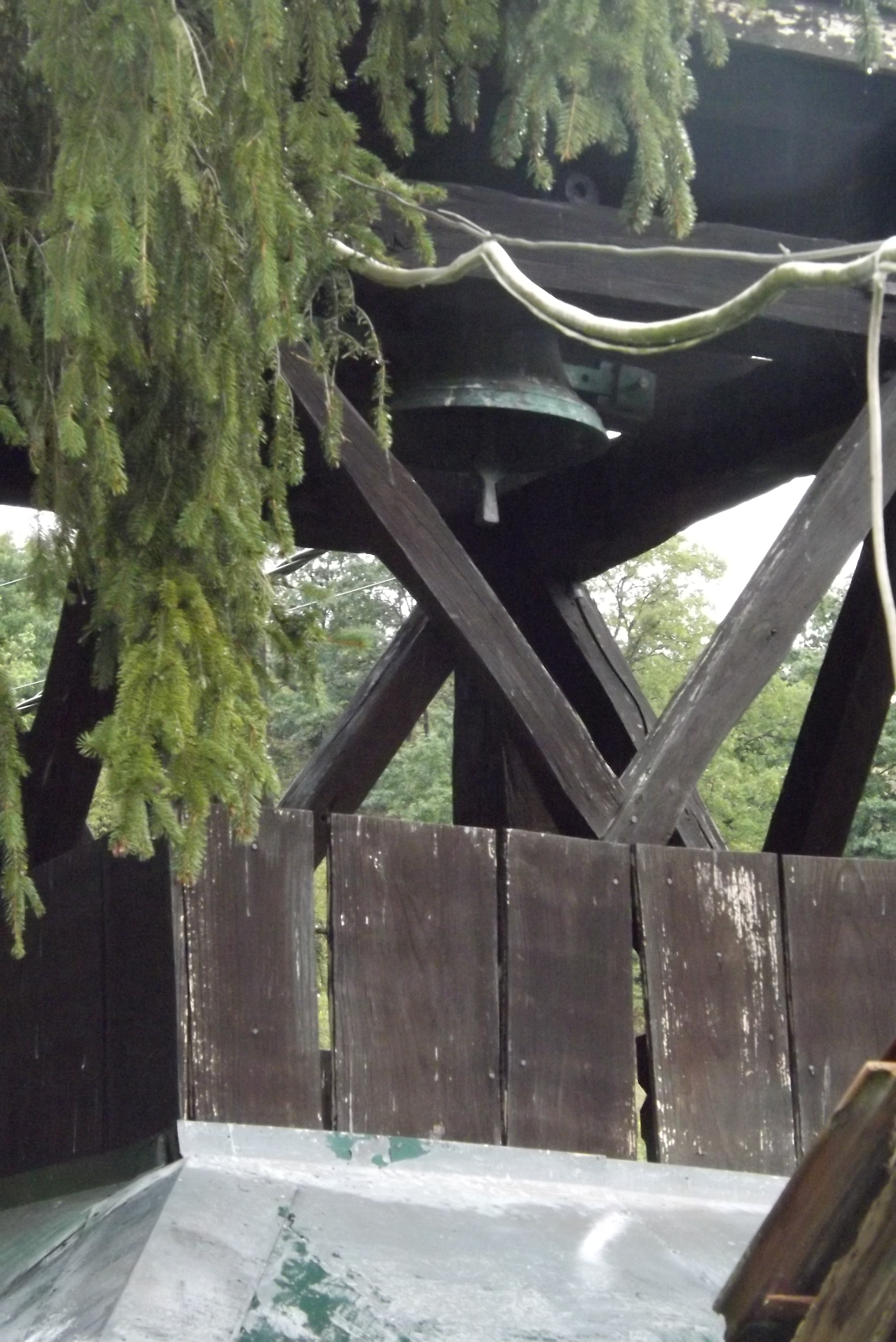 Latorpuszta, a harangláb harangja